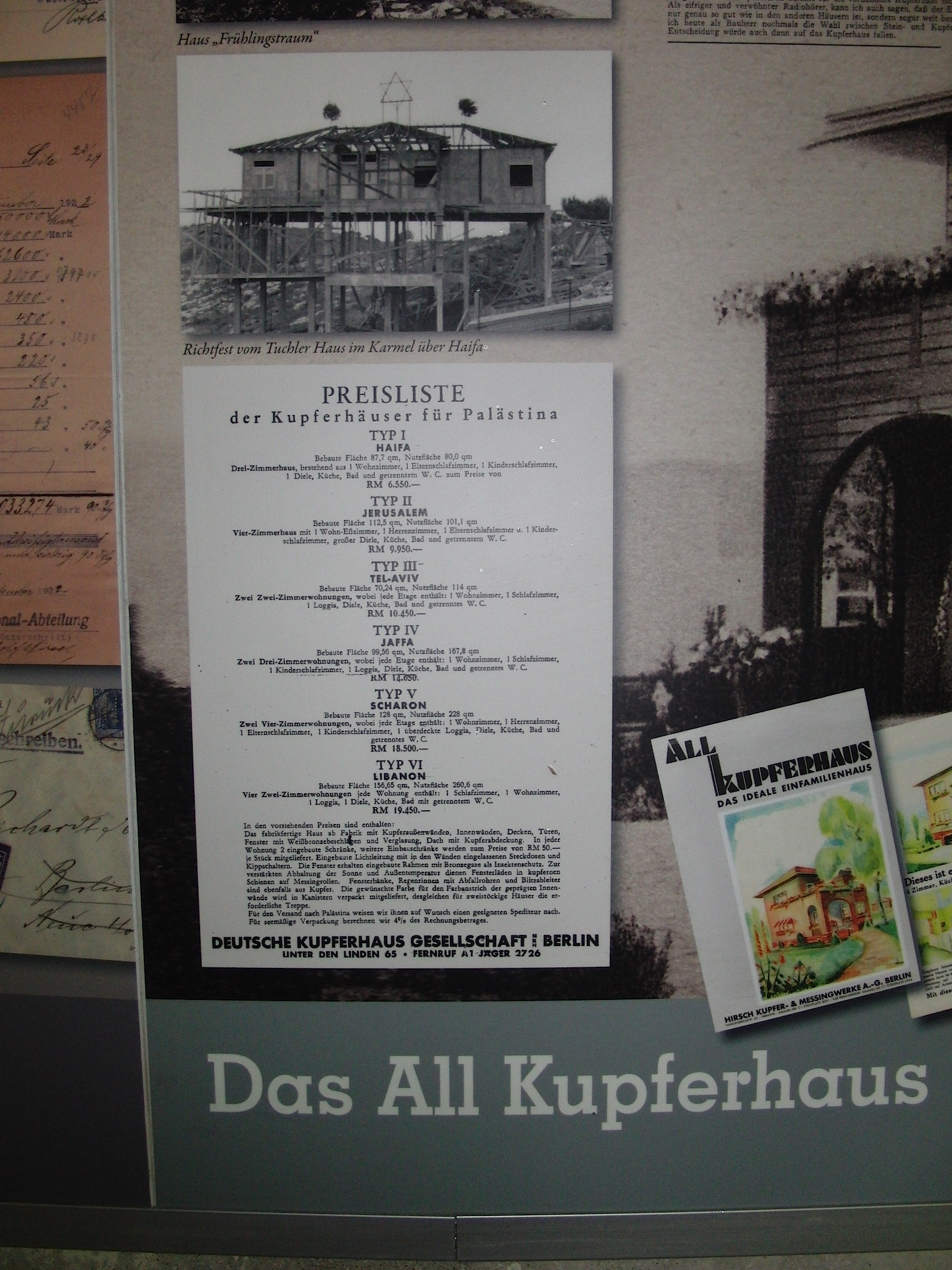 Preisliste der für Palästina bestimmten Kupferhäuser der ' Hirsch Kupfer- und Messingwerke' aus Eberswalde